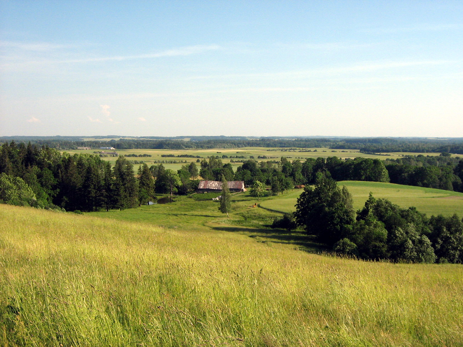 Lopaičiai, Rietavo savivaldybė Foto: Algirdas, 2007 m. birželio 12 d.